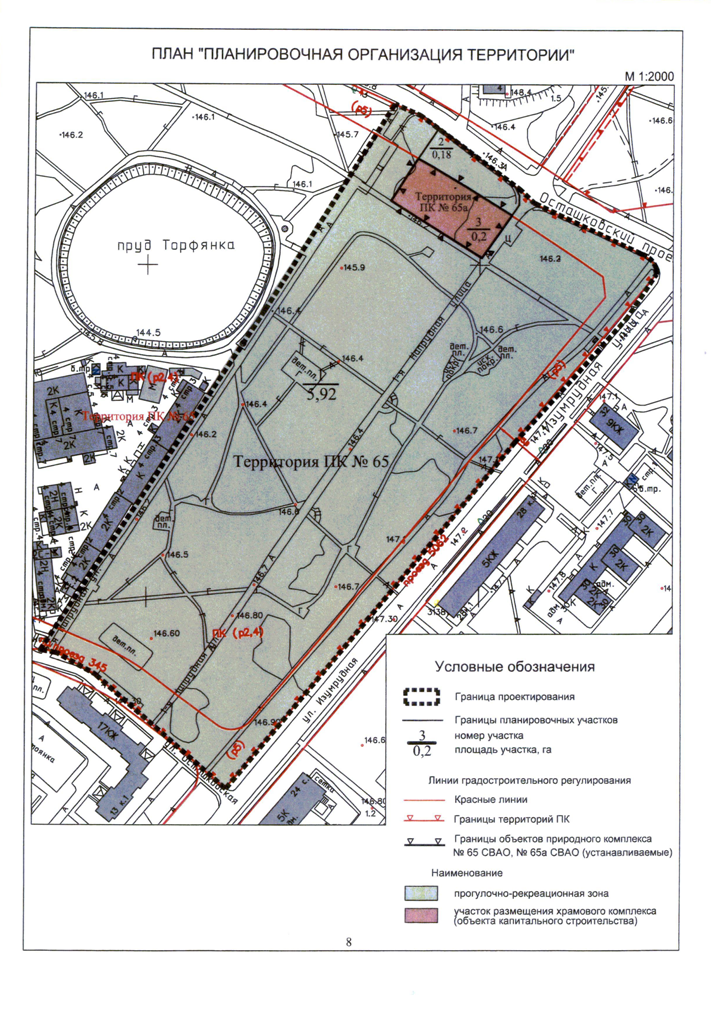 Московский парк Торфянка. План "Планировочная организация территории". Страница 8 Приложения 1 к Постановлению Правительства Москвы от 30 апреля 2013 г. № 280-ПП.